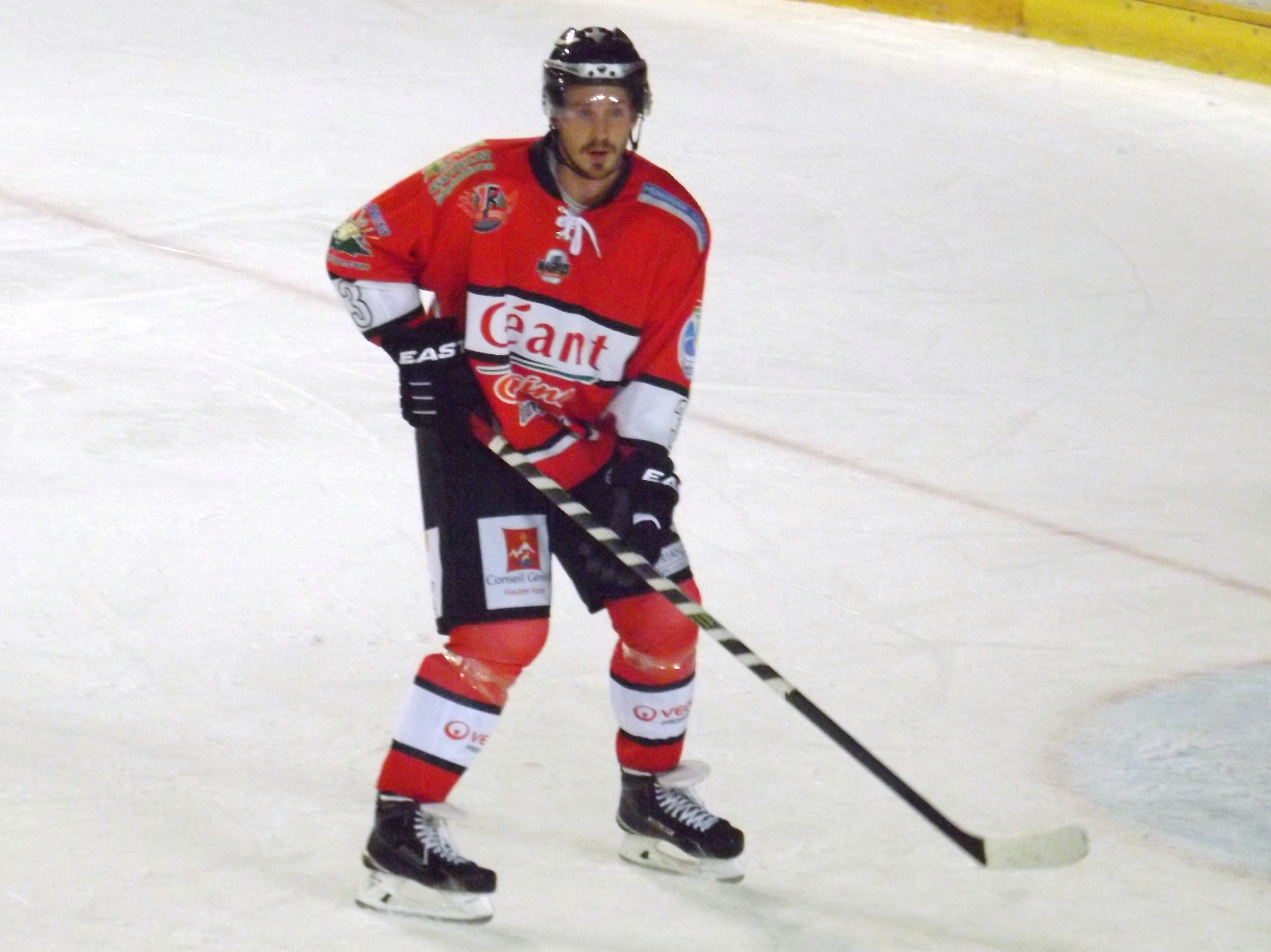 Joueur de hockey sur glace des Diables rouges de Briançon 2014-2015